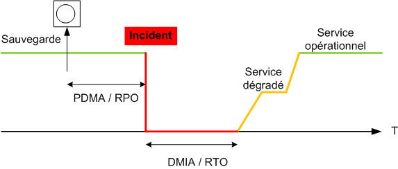 RTO = Recovery Time Objective RPO=Recovery Point Objective PDMA=Perte de Données Maximum Admissible DMIA=Durée Maximum d'Interruption Admissible